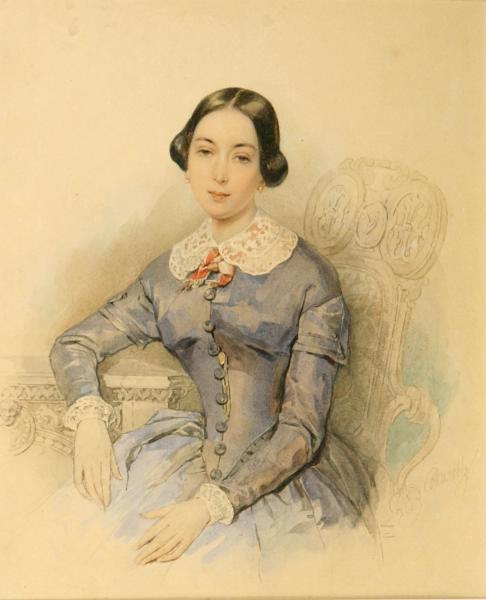 "Княжна Голицына Александра Александровна" 1840-е